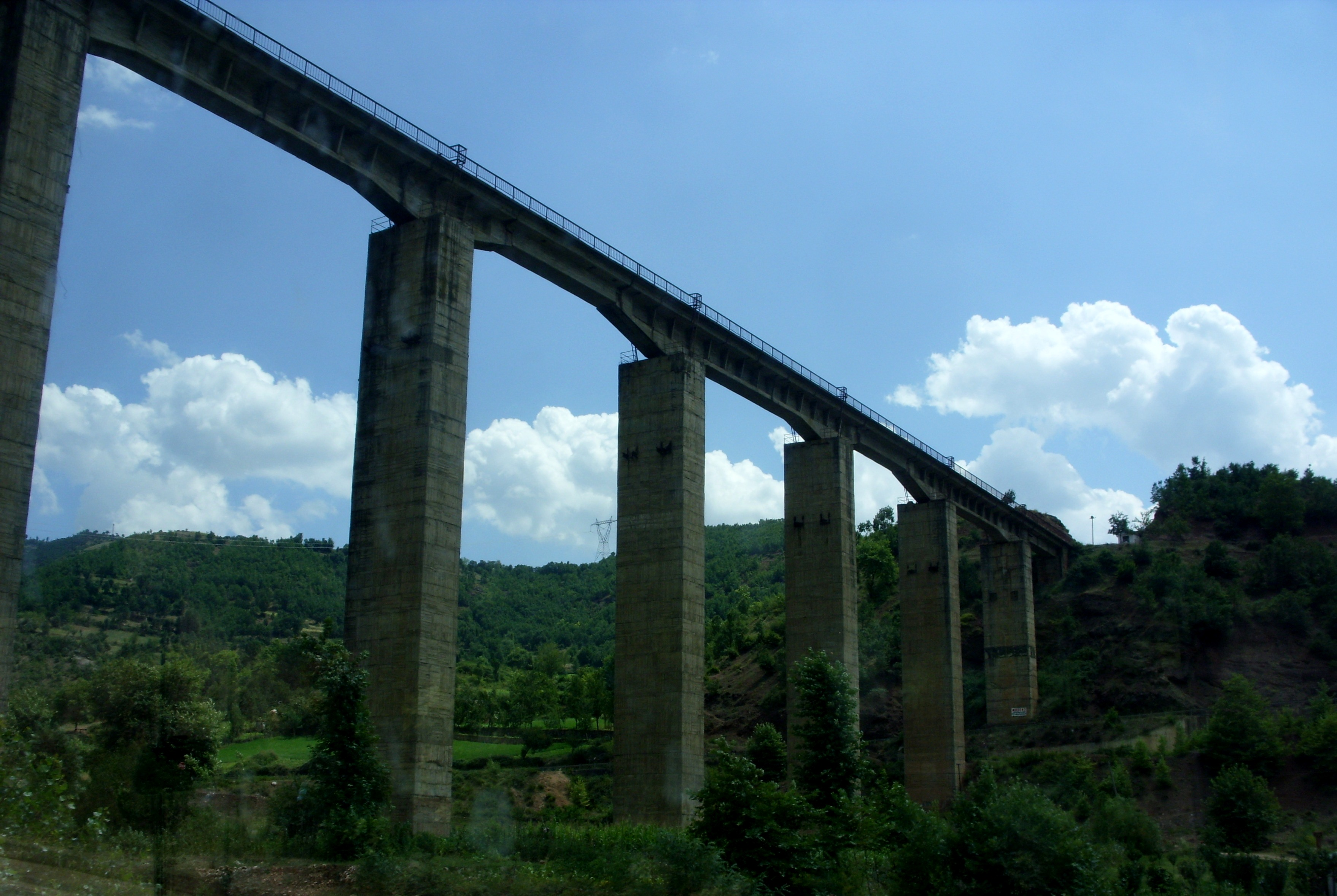 Eisenbahnbrücke im Shkumbintal östlich von Librazhd (Albanien)